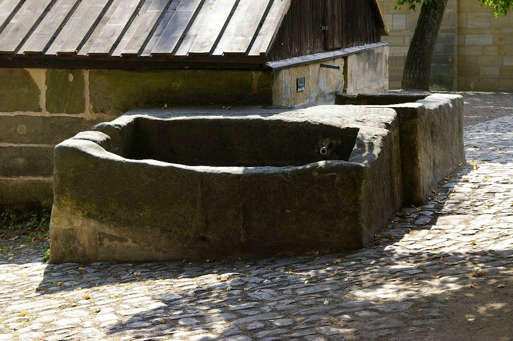 Bamberg - Alte Hofhaltung - Innenhofbrunnen